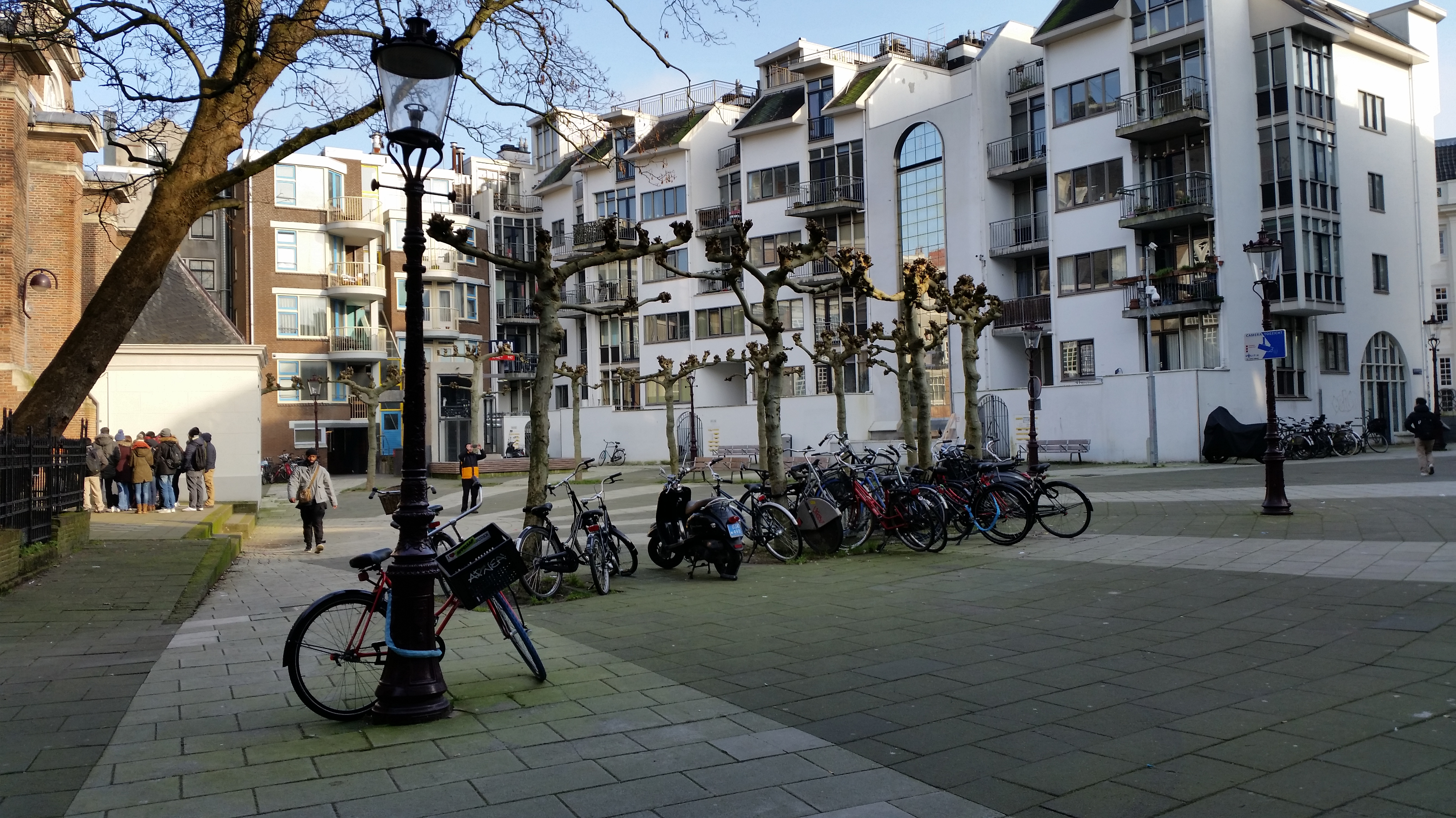 Impressie van het Zuiderkerkhof, Amsterdam-Centrum (januari 2020)